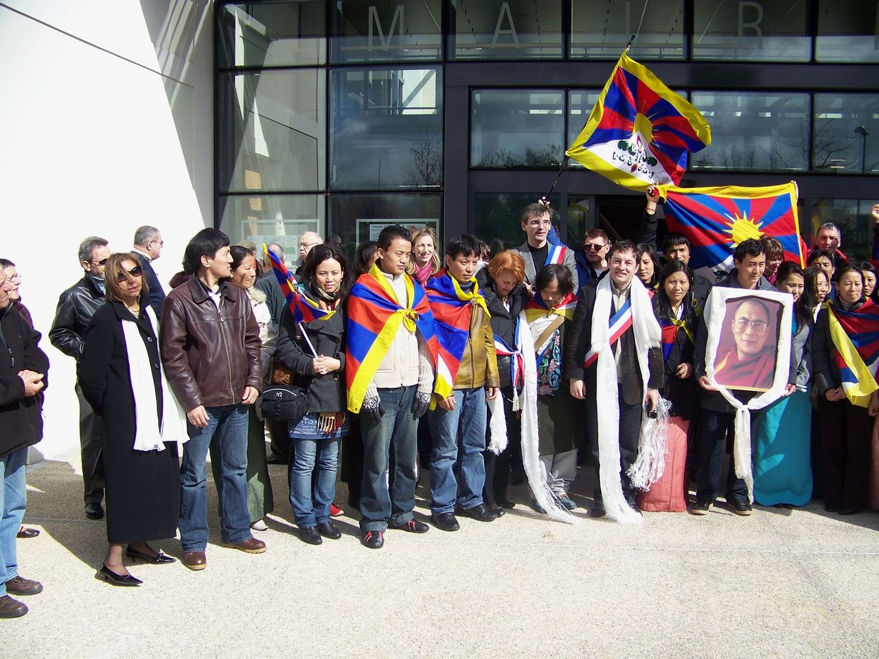 Le drapeau tibétain est hissé sur la mairie de Cesson (77). Cérémonie avec le maire, JM Brulé